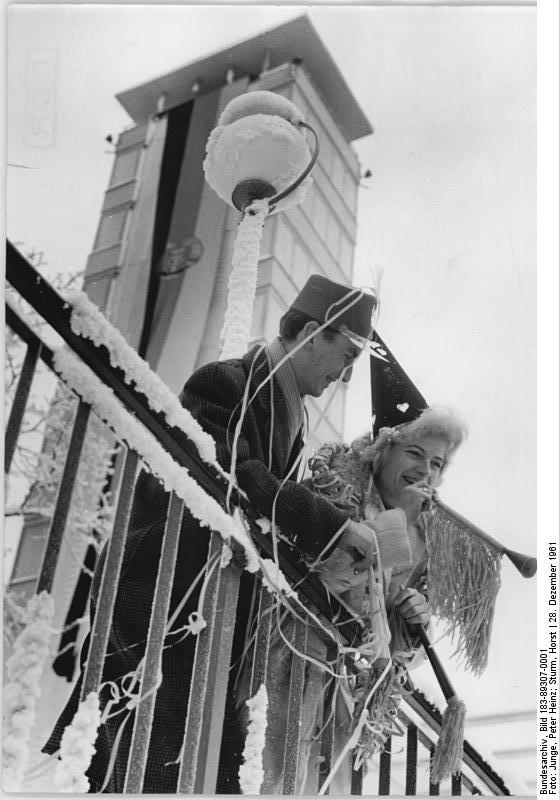 Neujahrsfest, Müggelturm Zentralbild Junge Sturm 28.12.1961 Herzlich willkommen! heißen mit einem "Fanfarenstoß" Gitta und Bodo Schulze das neue Jahr vor dem Müggelturm in Berlin, der am 31.12.61 eröffnet wird. Auch dieses Ehepaar wird bei der Einweihungsfeier dabeisein, das ab Januar nächsten Jahres als Steward auf der "Völkerfreundschaft" tätig sein wird.